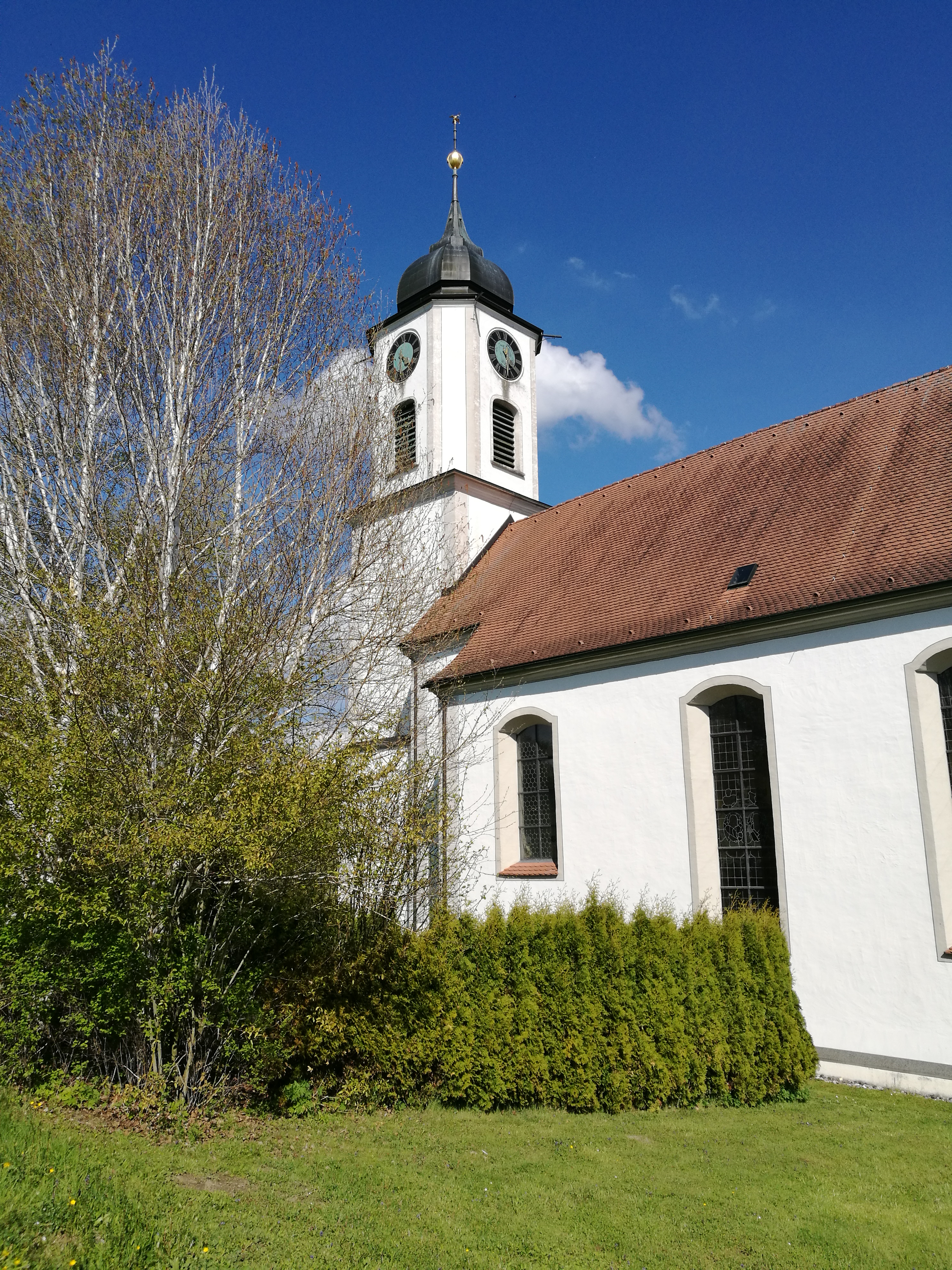 Deutschland (D) - Baden-Württemberg (BW) - Landkreis Konstanz (KN) - Mühlingen: Kirche "St. Martin"